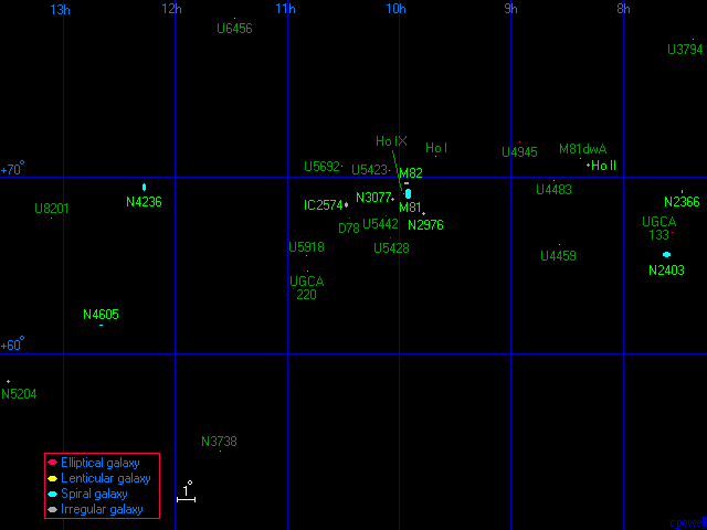 Mappa del Gruppo M81